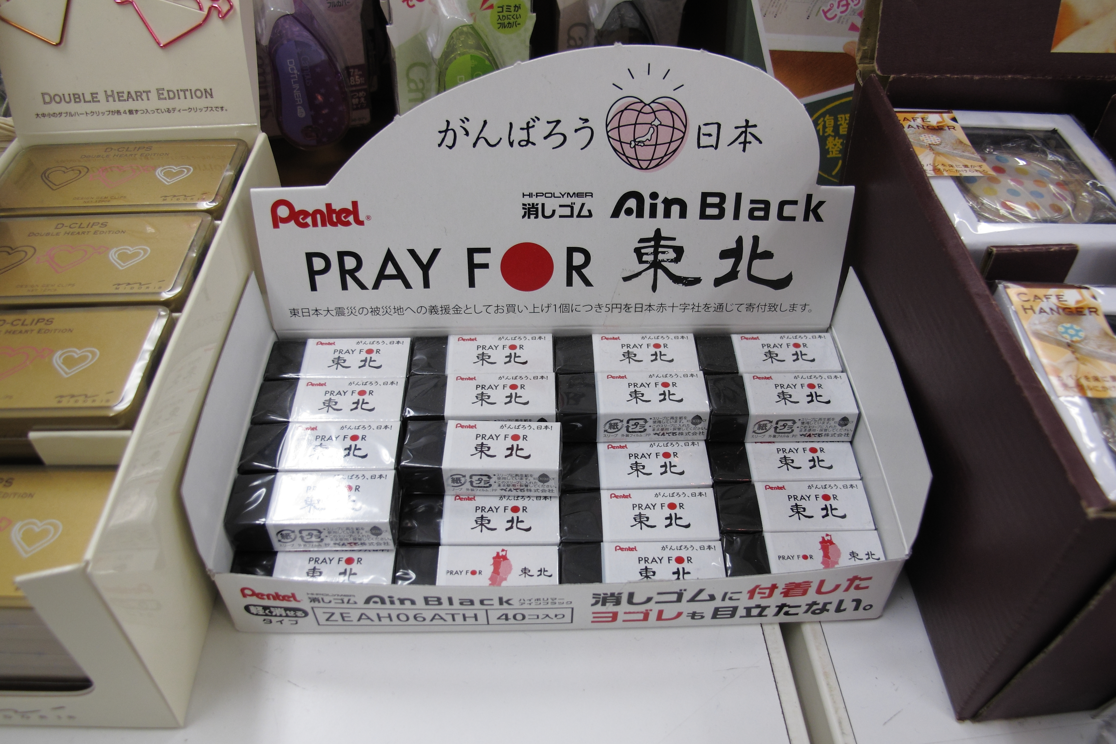 消しゴム1個につき5円の寄付って、けっこう凄いと思います。 だけれども、なぜ黒色なのだろう。まるで襲いかかる津波のような色じゃないか。 （じゃあ何色が良いか？と言うと、やっぱり黒色だと思うけれどもね） こういう復興義援活動って、小額でも「継続」が重要だろうから、 SoftBankが携帯電話でやってるチャリティホワイトとかって凄く良いと思う。